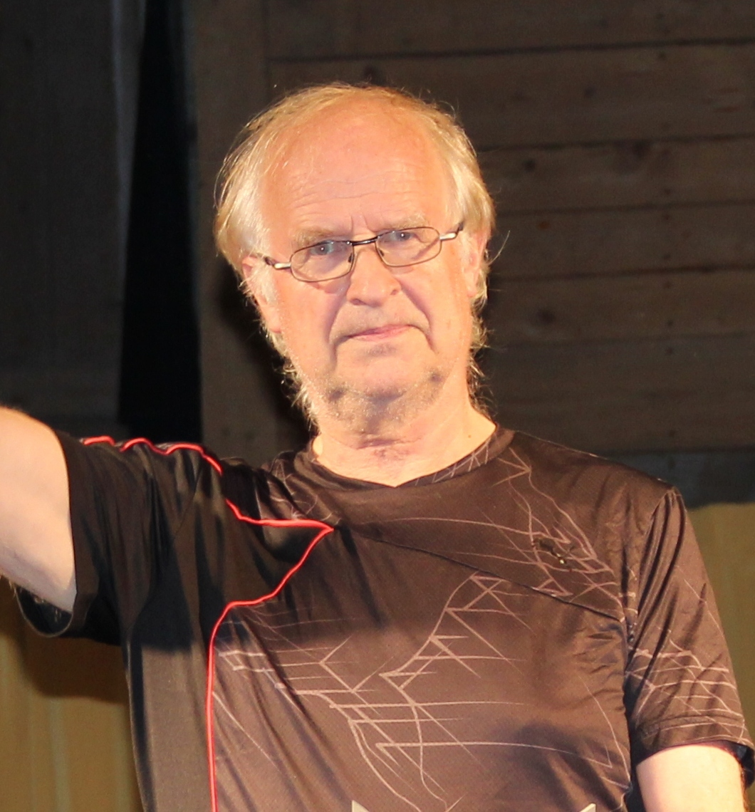 Professori (1945-2015)